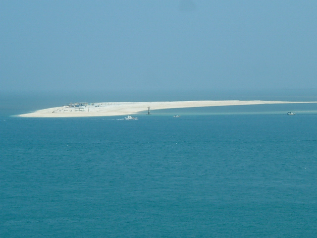 中文（台灣）: 從臺灣澎湖縣員貝嶼遠眺澎澎灘。